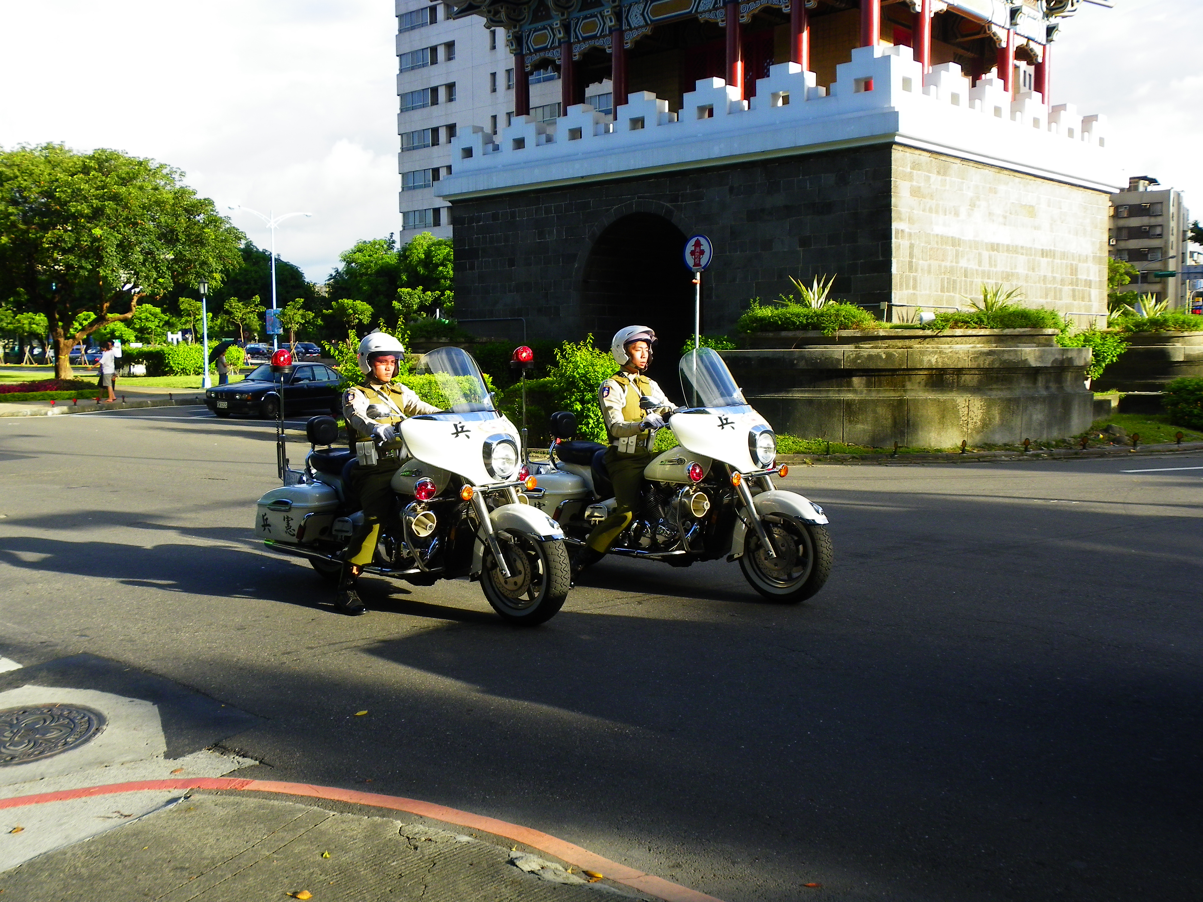 執行要人護衛任務的中華民國憲兵重型機車隊，攝於臺北市中正區愛國西路小南門北面。